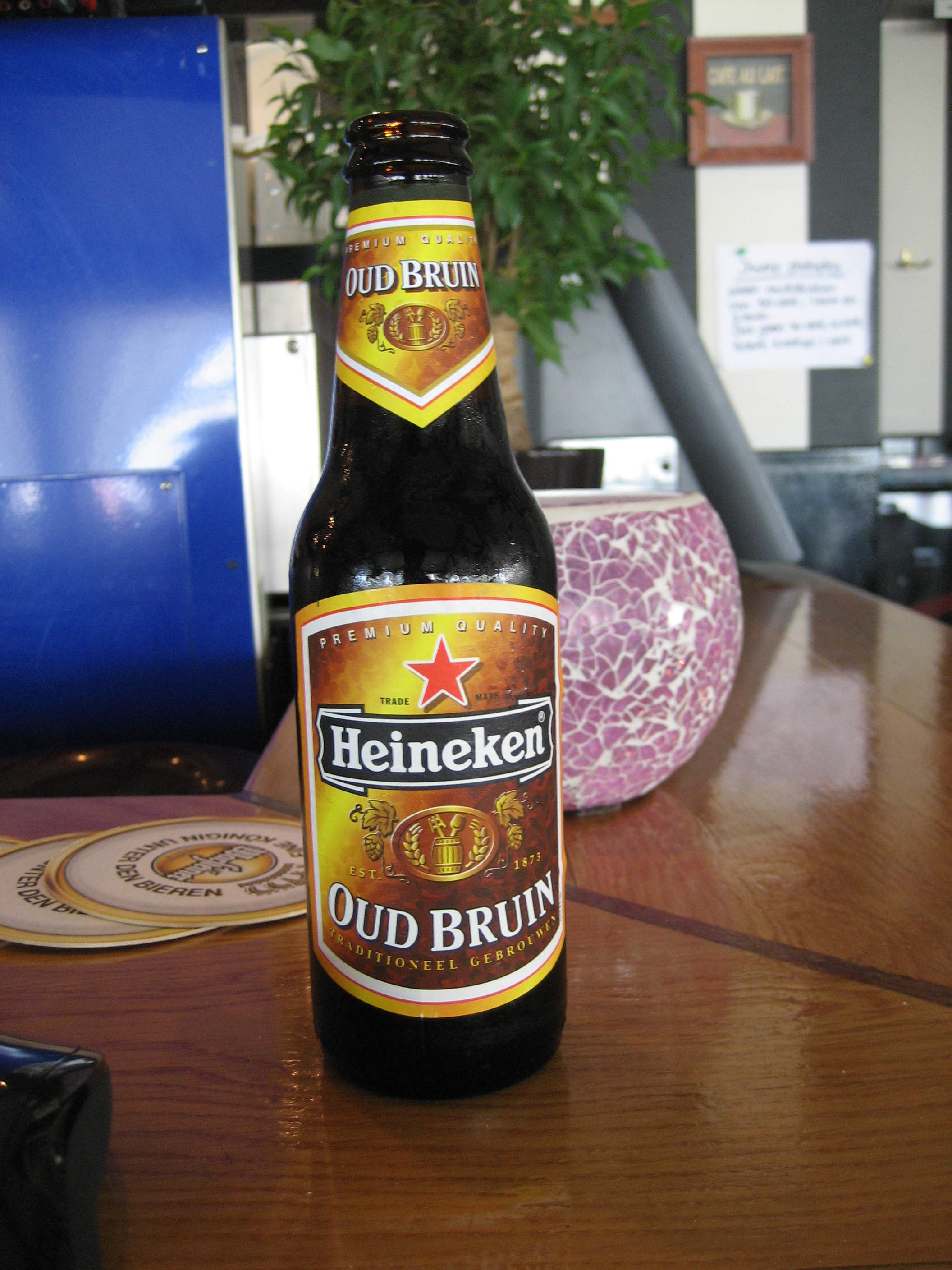 Heineken Oud Bruin, available in the Netherlands.